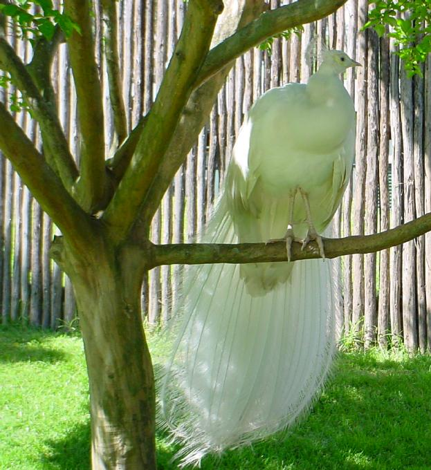 Tomada por mí en un zoológico local